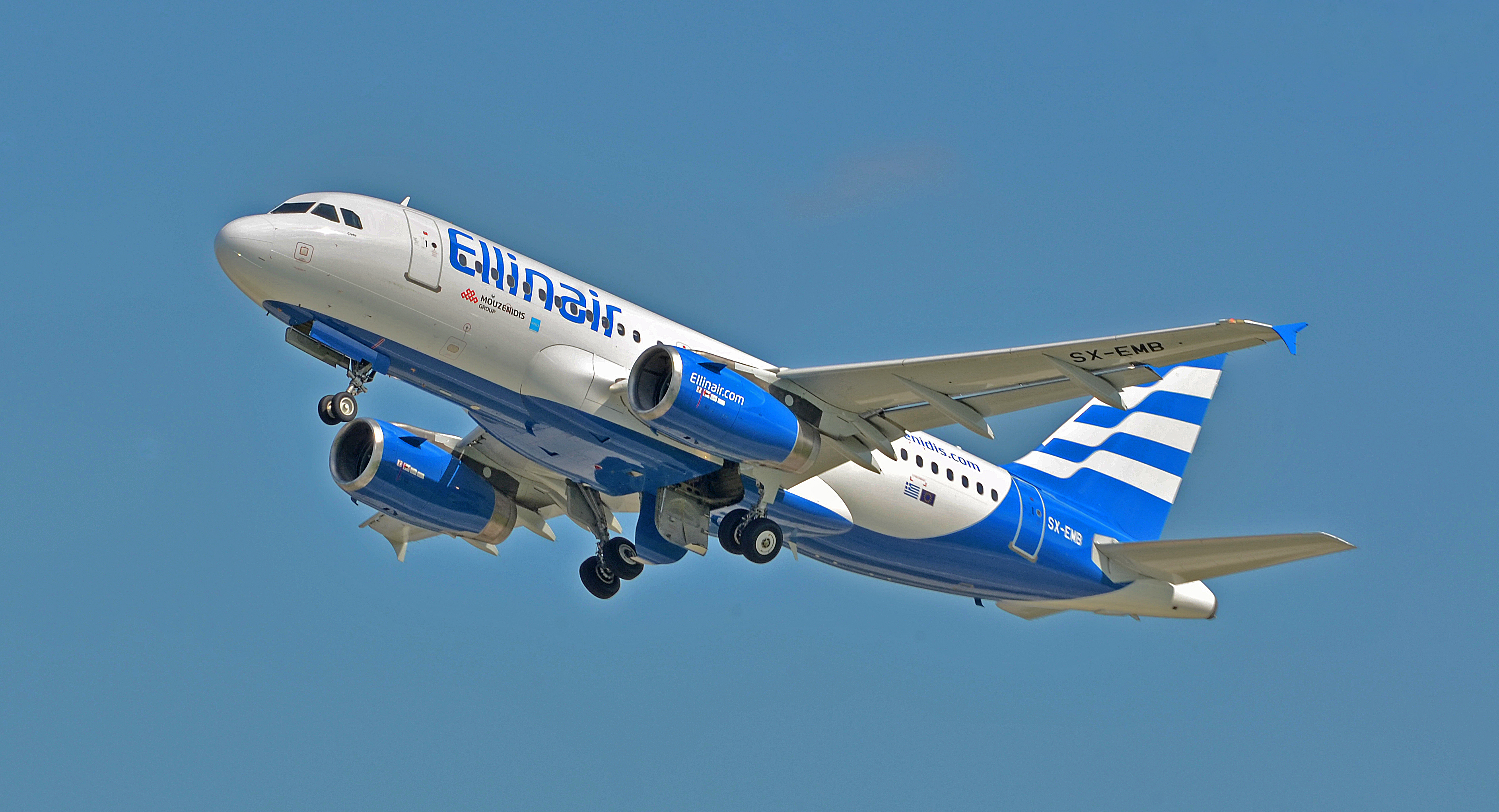 Подробнее здесь